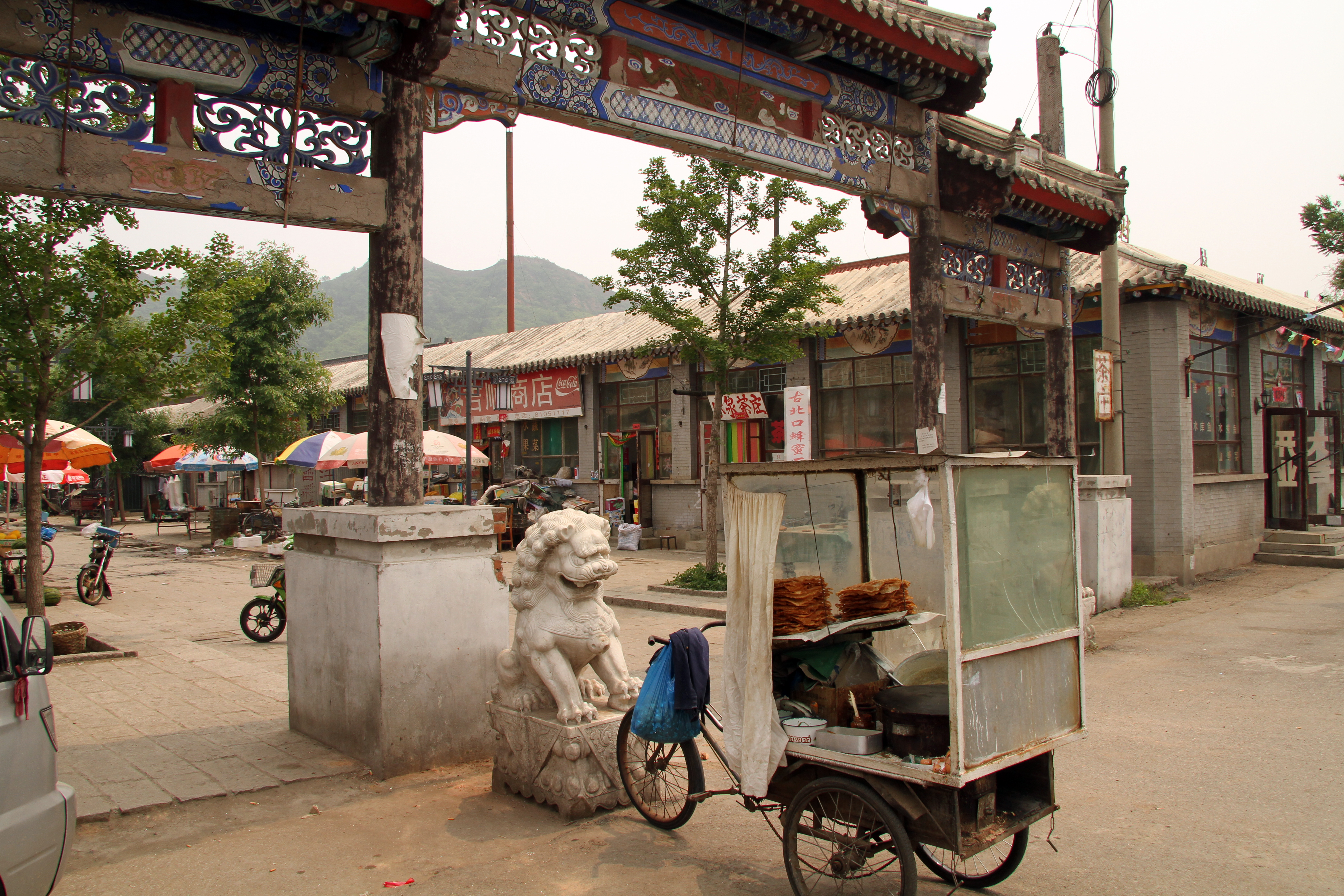 Gubeikou 37